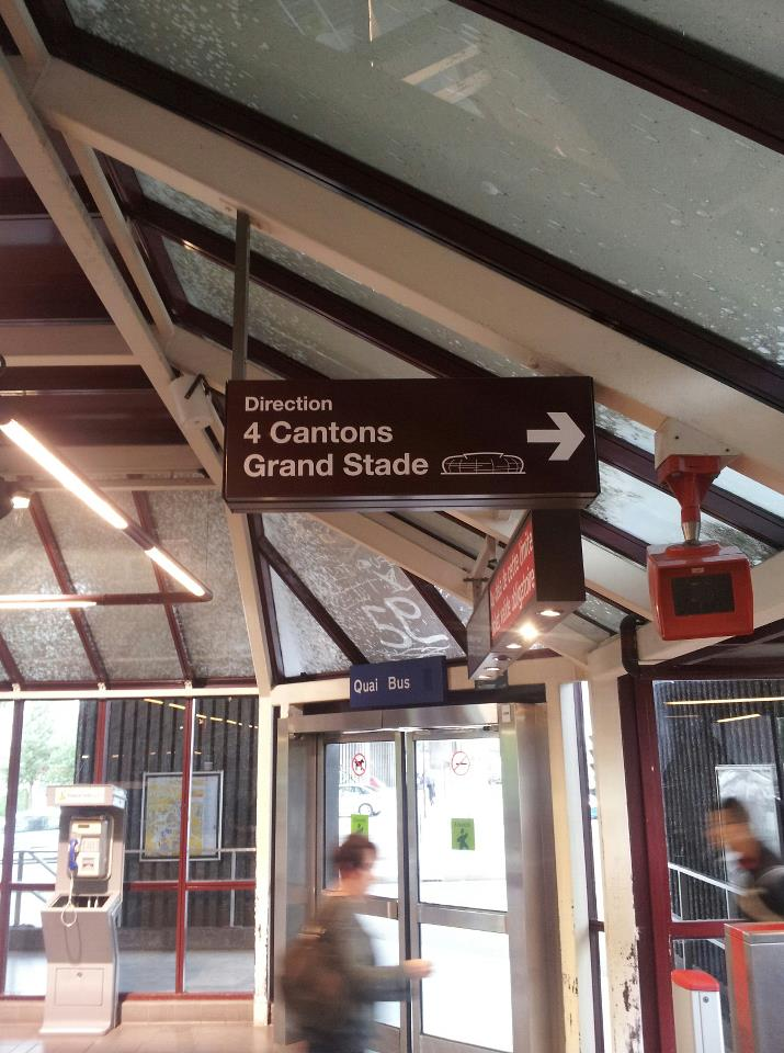 Dans la station de métro Lille CHR Oscar Lambret , un panneau de direction ici vers 4 cantons - Grand Stade